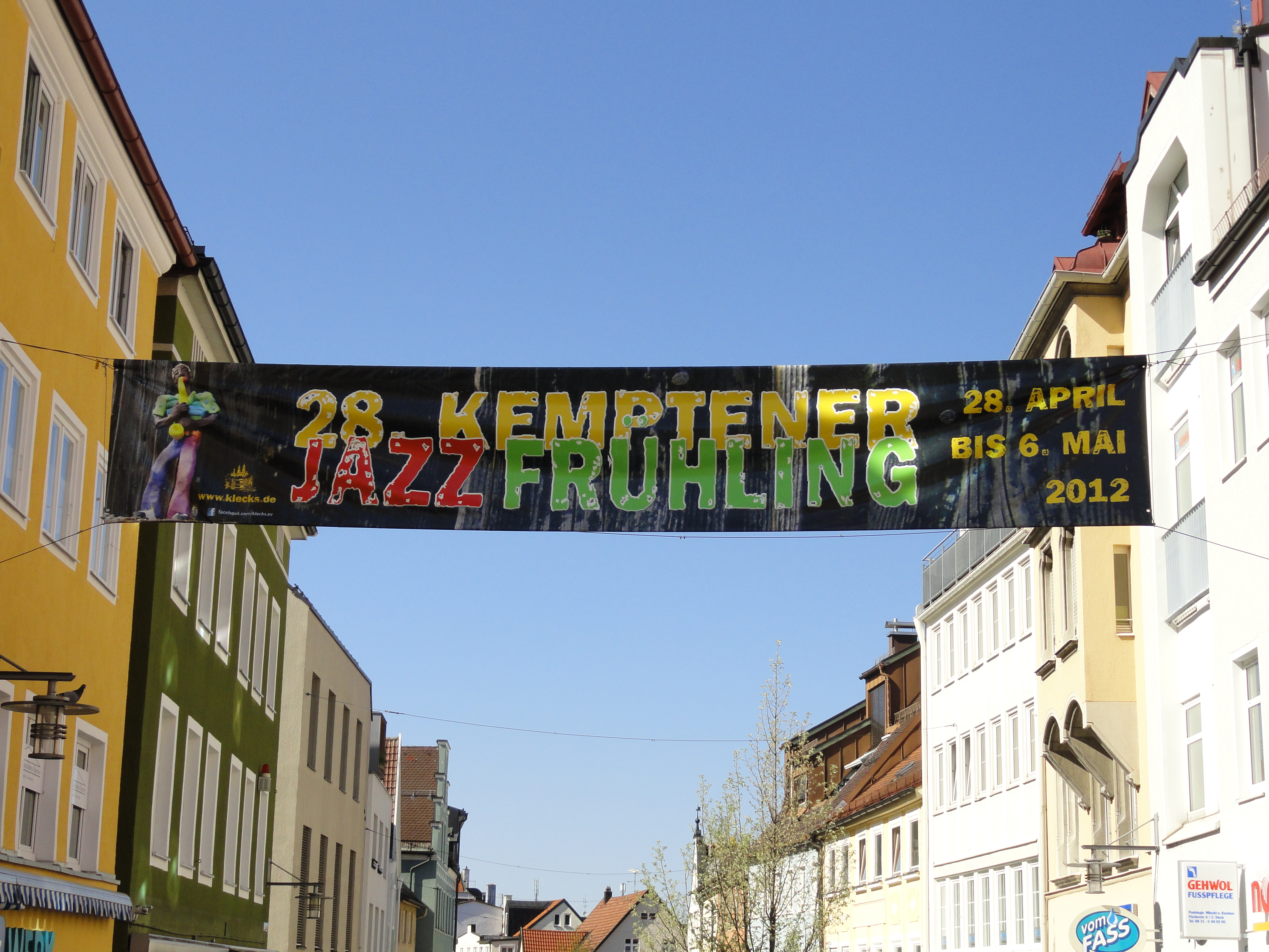 Plakat des Kemptener Jazz Frühlings im Jahr 2012 - Fußgängerzone (Fischerstraße)